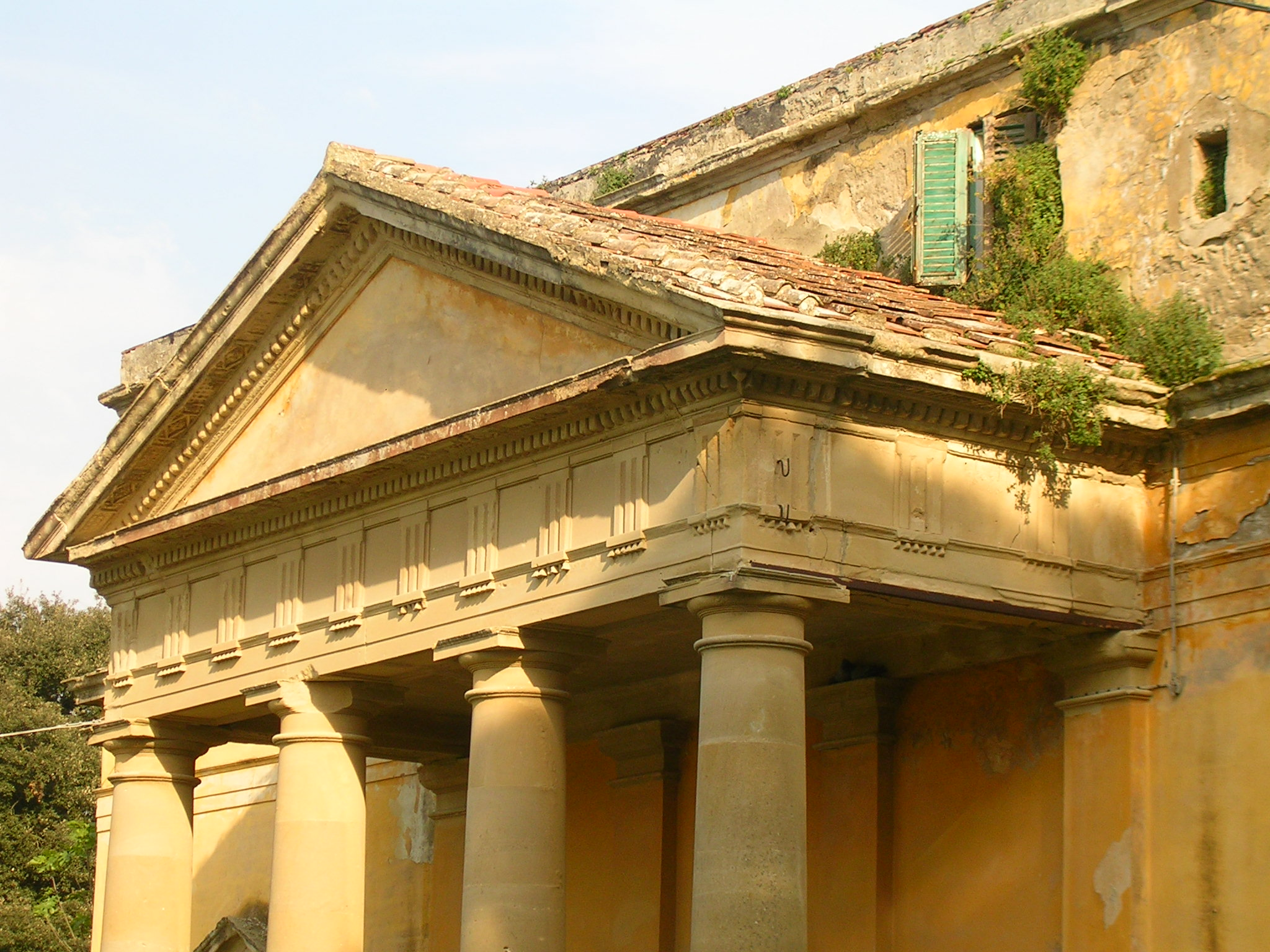 Livorno: i Bagnetti della Puzzolente (XIX secolo) progettati da Pasquale Poccianti e ora tristemente abbandonati.